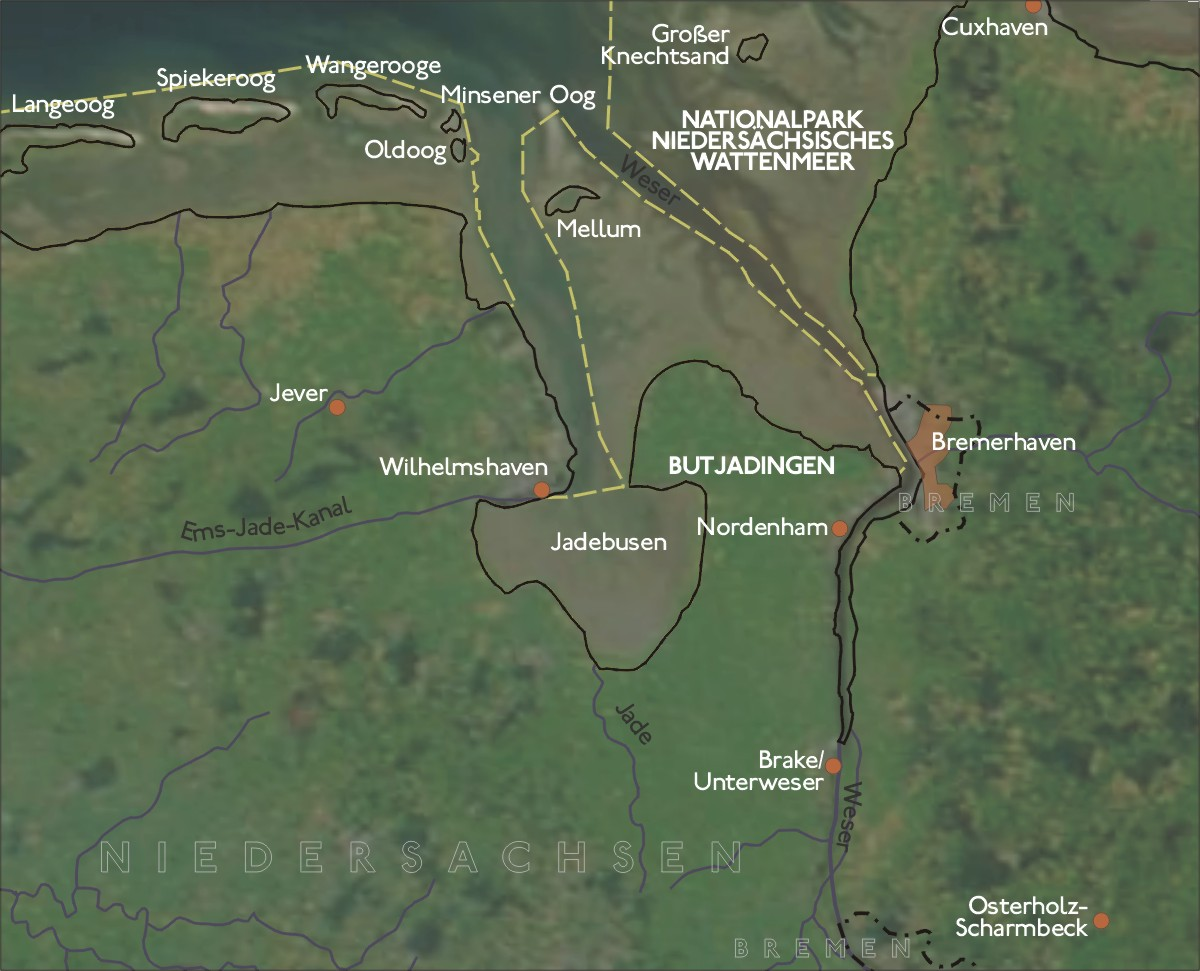 Jadebusen und Jadefahrwasser. Eigene Darstellung